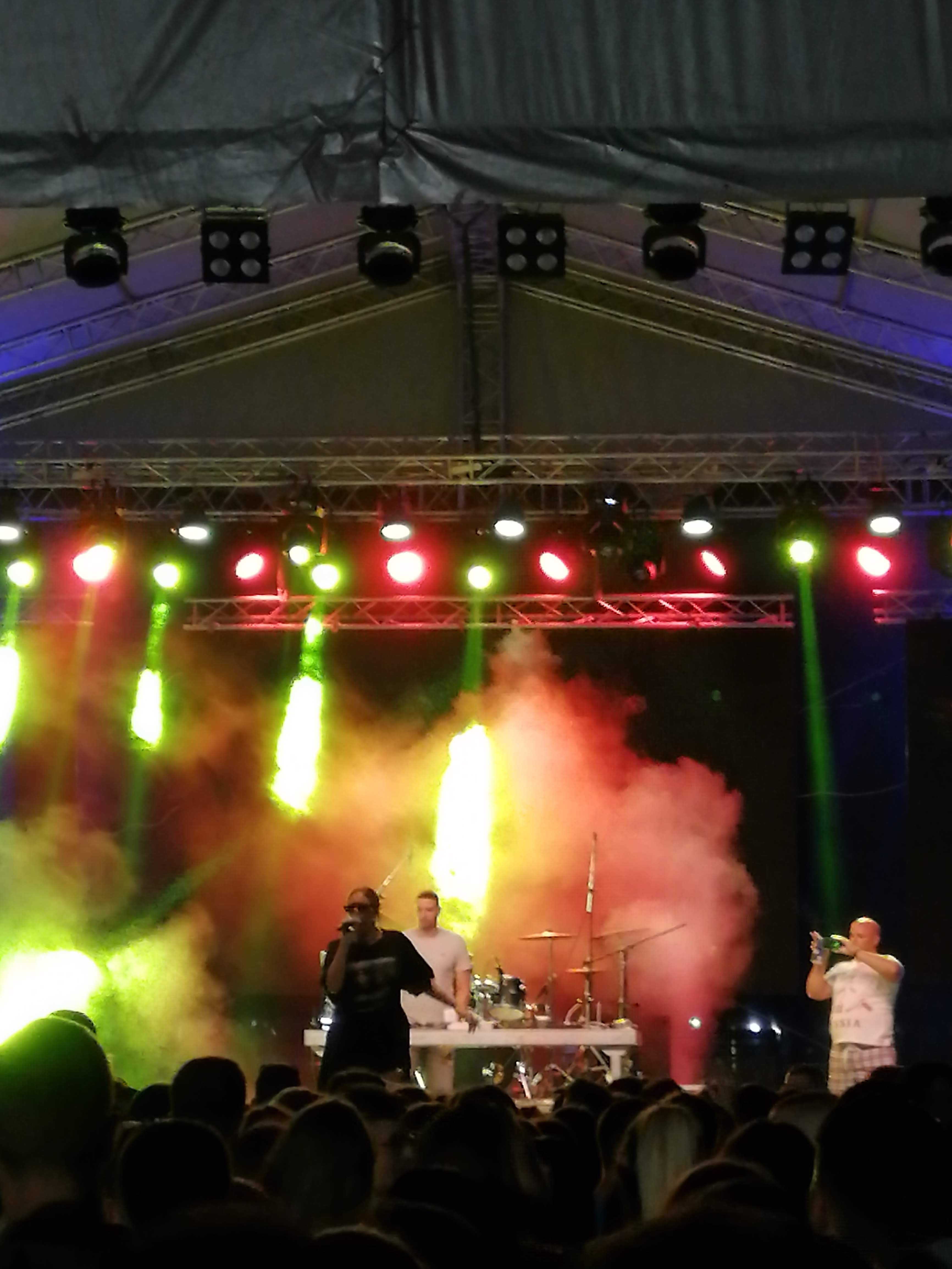 Srpski (latinica): Senidah, Overload festival, Vladičin Han